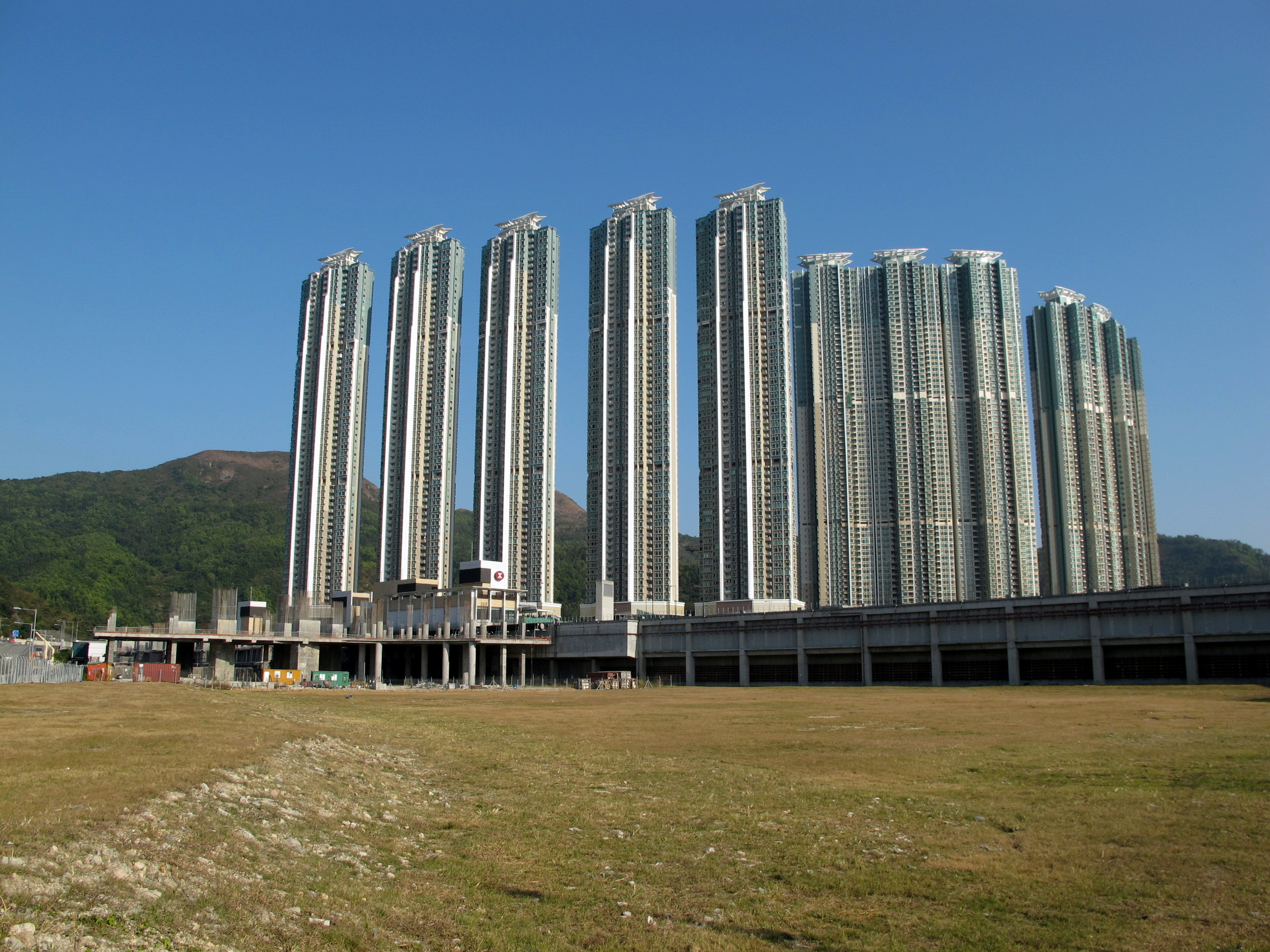 Lohas Park 日出康城